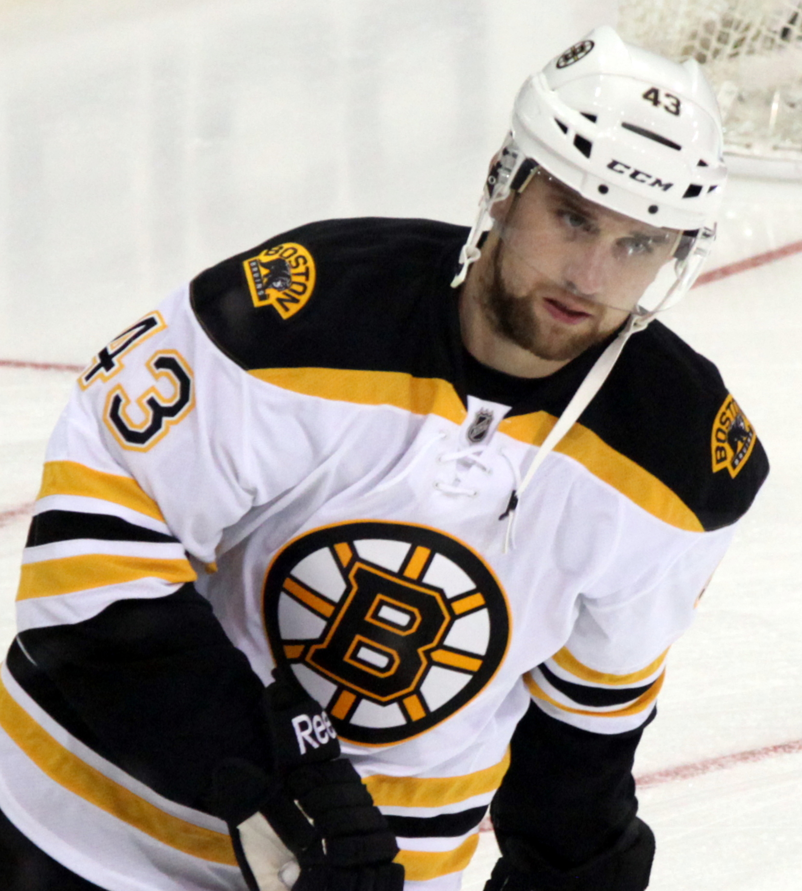 DeFazio in September 2015.